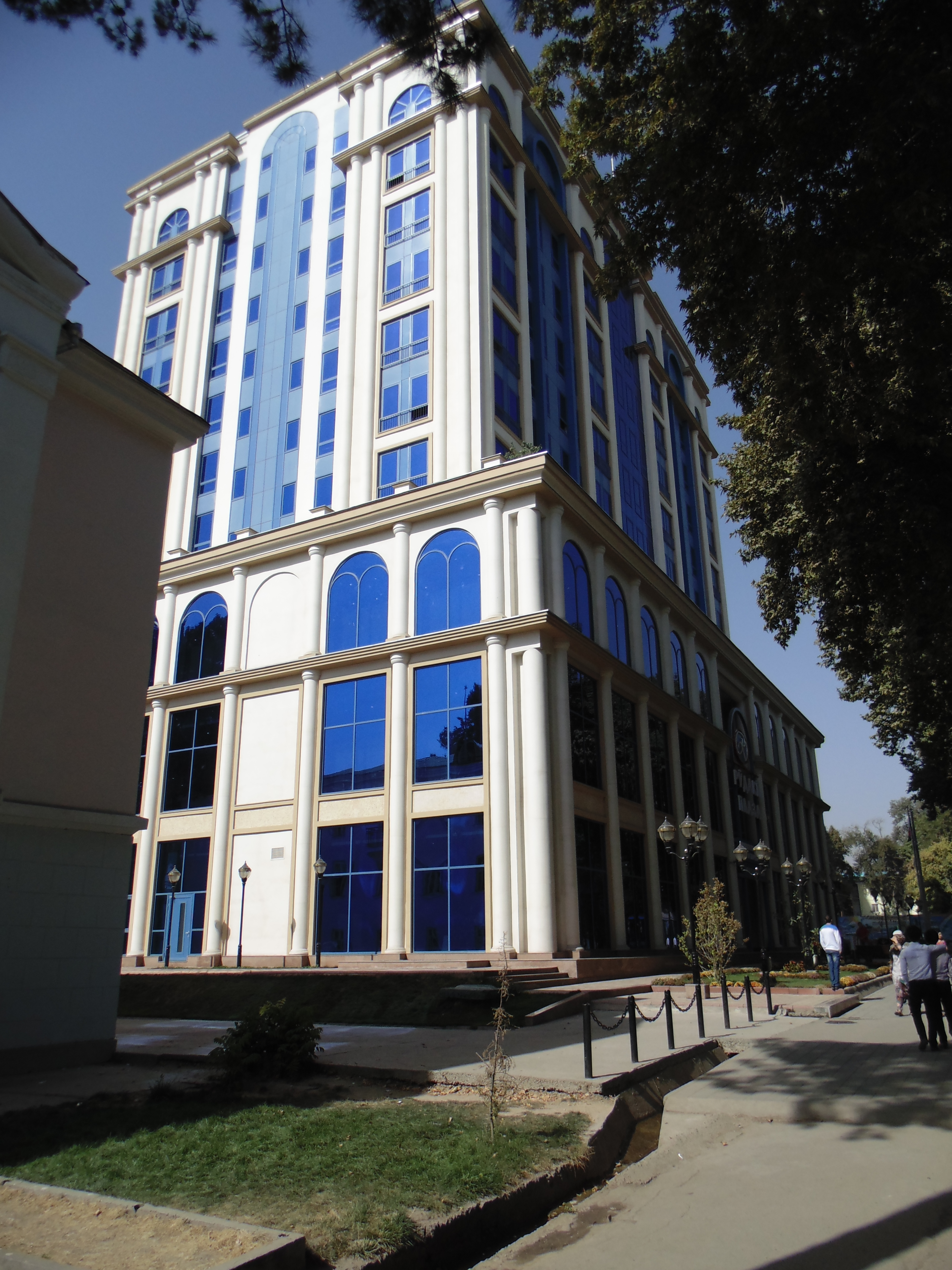 Головной офис Ориёнбанка вид с боку (Душанбе)